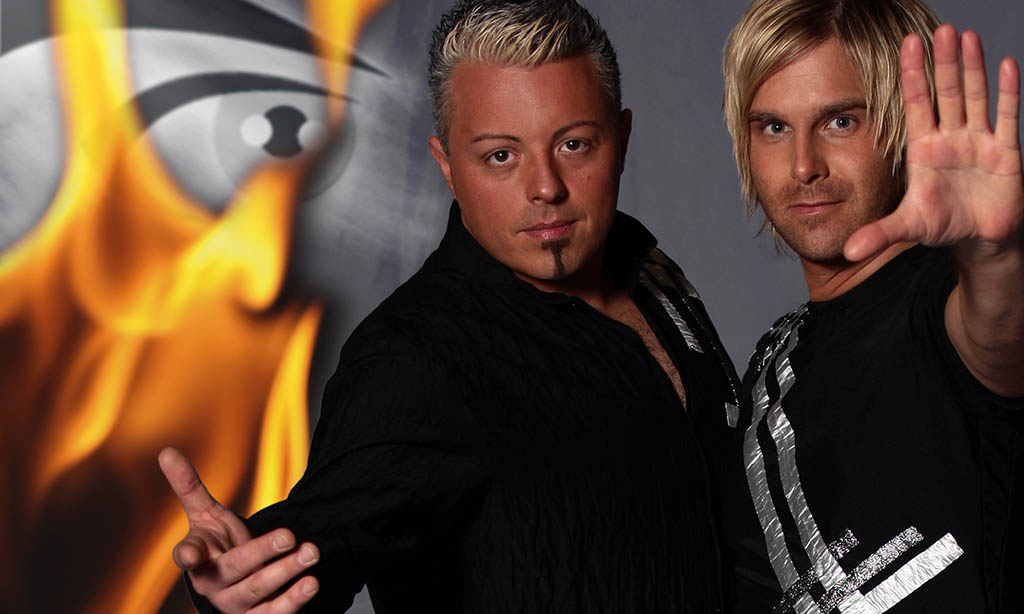 Marc und Alex, Flamme